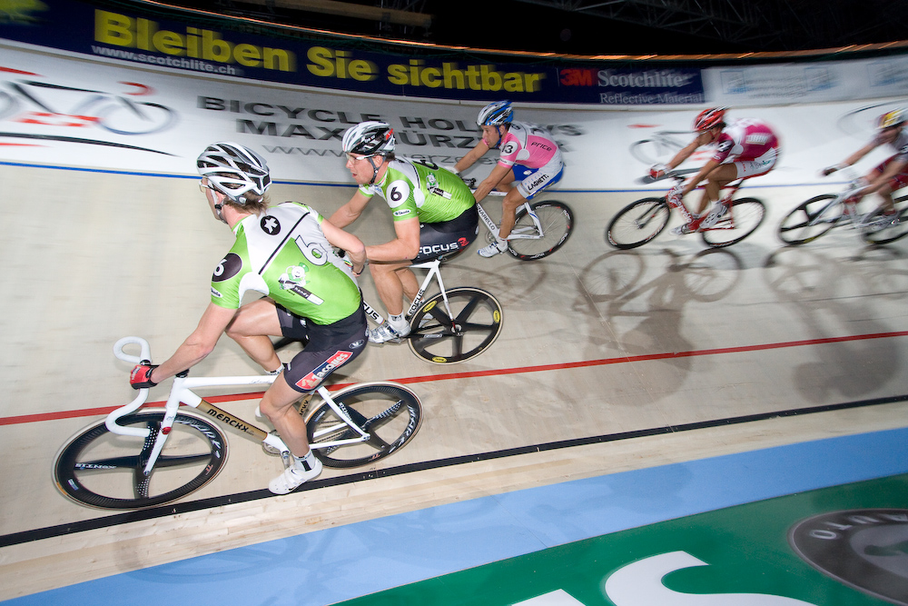 Iljo Keisse & Robert Bartko, Sixdays Zürich 2007-2008